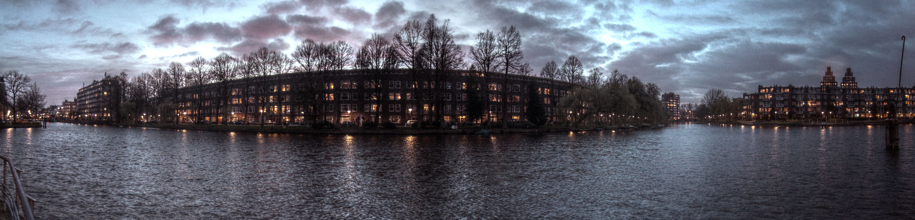 De Geuzenkade in Amsterdam-West gezien vanaf de Van Reigersbergenstraat. Maart 2014